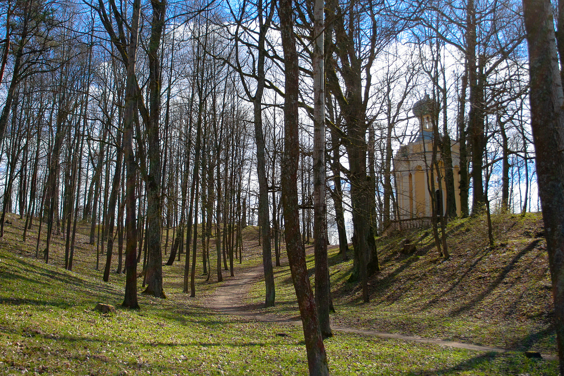 A. Pushkin museum park in Markučiai, Vilnius